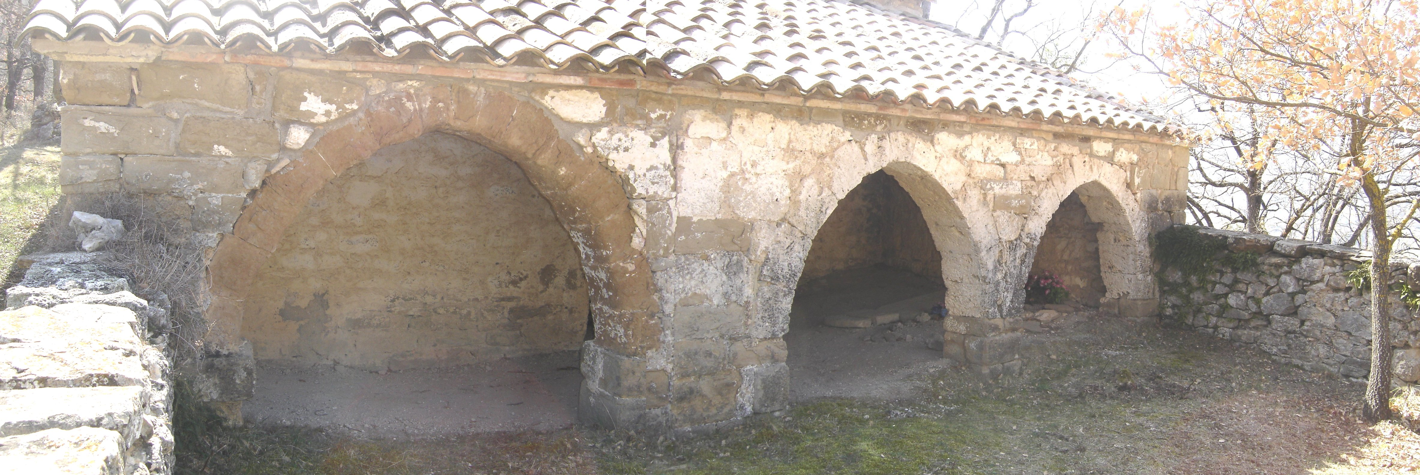 L'ermita de Sant Lleïr de Casabella, al municipi de La Coma i la Pedra, a la Vall de Lord (Solsonès). Els tres arcs del porxo vistos des del cementiri